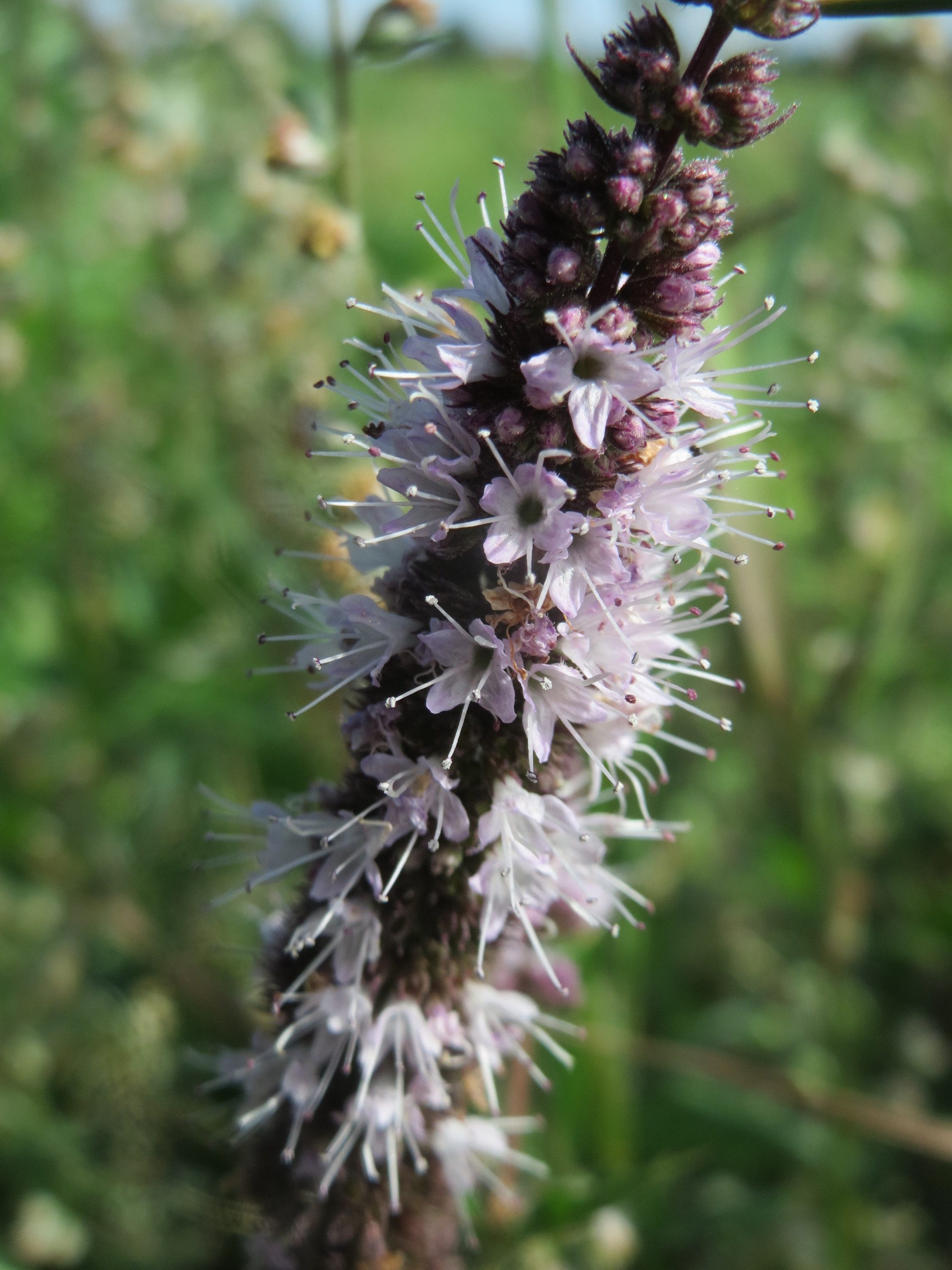 Grüne Minze (Mentha spicata) in der "Au" bei Hockenheim